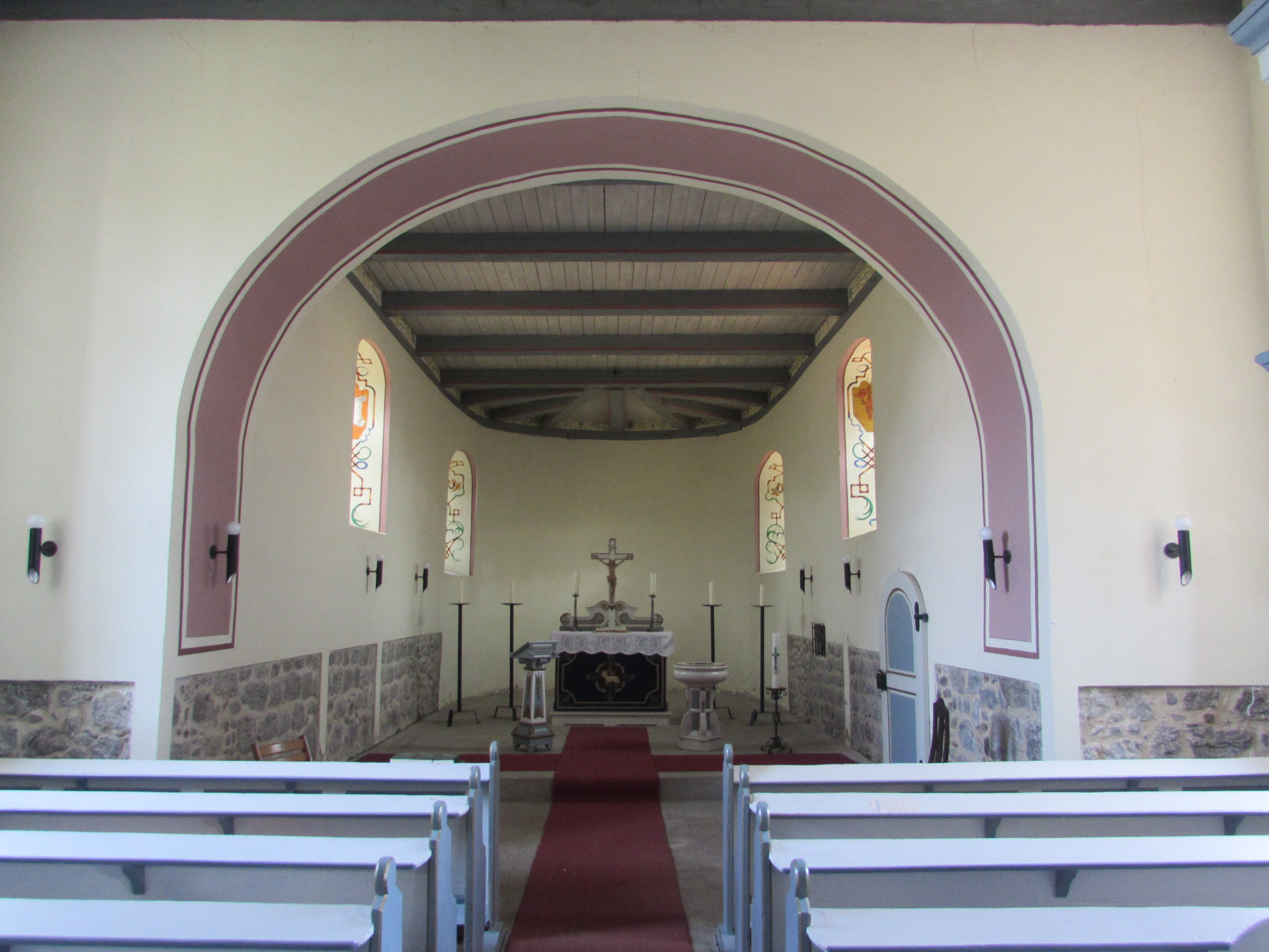 kirche zitz innen